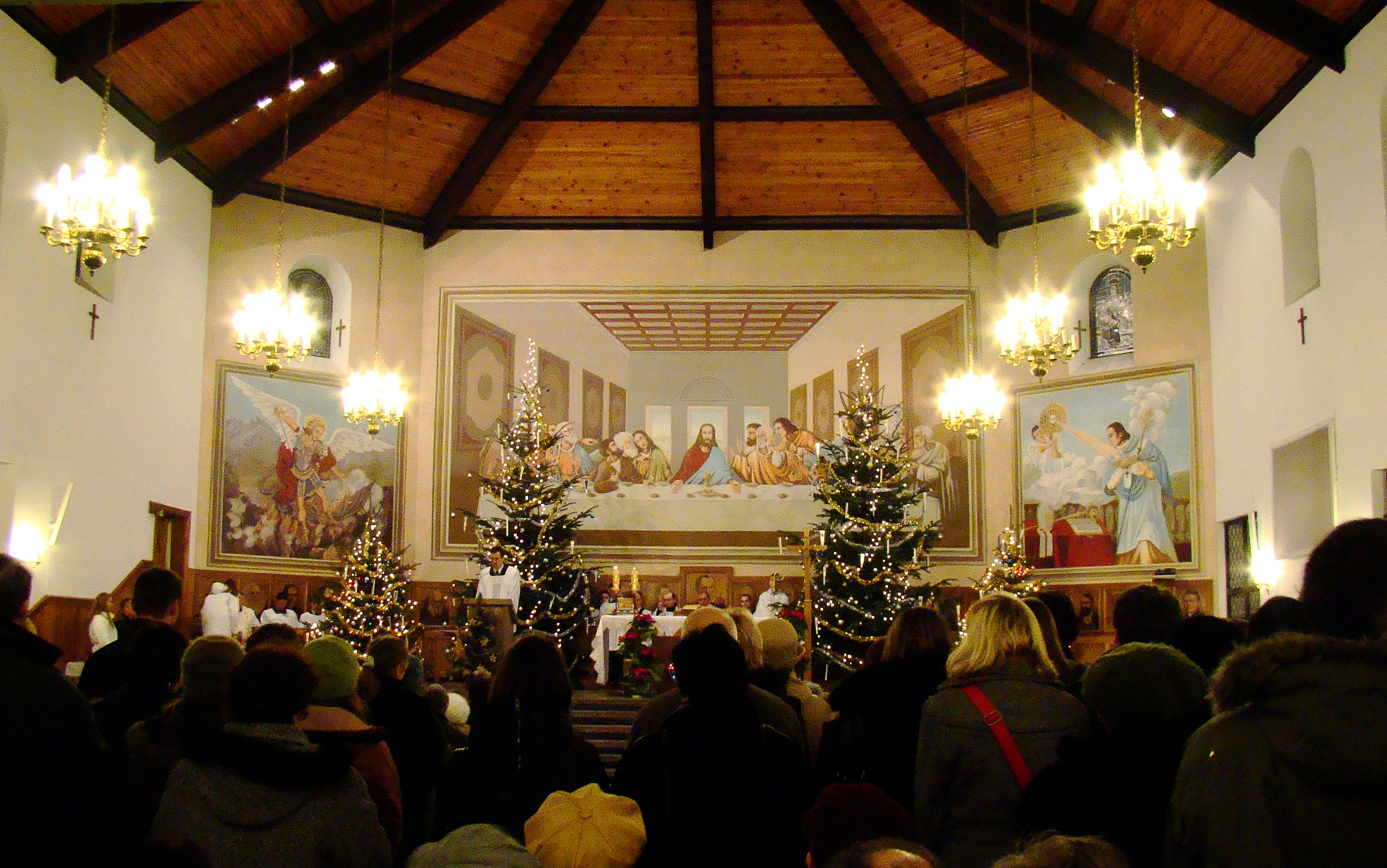 Pasterka 2009 - Kościół pw. św. Rafała i Michała w Aleksandrowie Łódzkim (powiat zgierski, województwo łódzkie), Polska